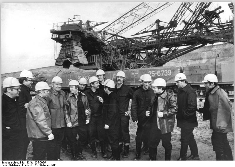 Witznitz, Berufswettbewerb im Baggern ADN-ZB Gahlbeck 25-10-80-Bau- Bez. Leipzig: Internationale Meisterschaften der Schaufelradbaggerfahrer- Zum Leistungsvergleich angetreten sin die Baggerfahrer aus der UdSSR, der CSSR und der VR Bulgarien gemeinsam mit ihren Kollegen aus der DDR. Vor dem Wettbewerb am 24.10.80 wurden die Aufgaben - Beladen von 7 Abraumwagen in vorgegebener Zeit, sicherheitstechnische Fragen und Bewegungen mit dem Großgerät- besprochen. Der Vergleich wird im Tagebau Witznitz des Braunkohlewerkes Borna ausgetragen. Bitte auch Motiv W1025-24N beachten!